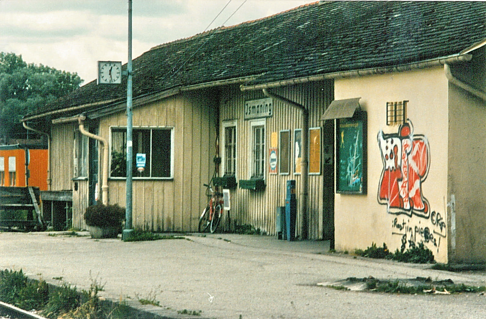 Ehemaliges Bahnhofsgebäude von Ismaning, Landkreis München, Regierungsbezirk Oberbayern, Bayern. Zustand vor dem Abbruch ca. 1989.